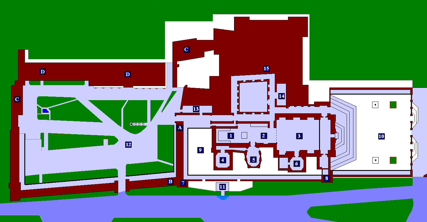 Plan klasztoru